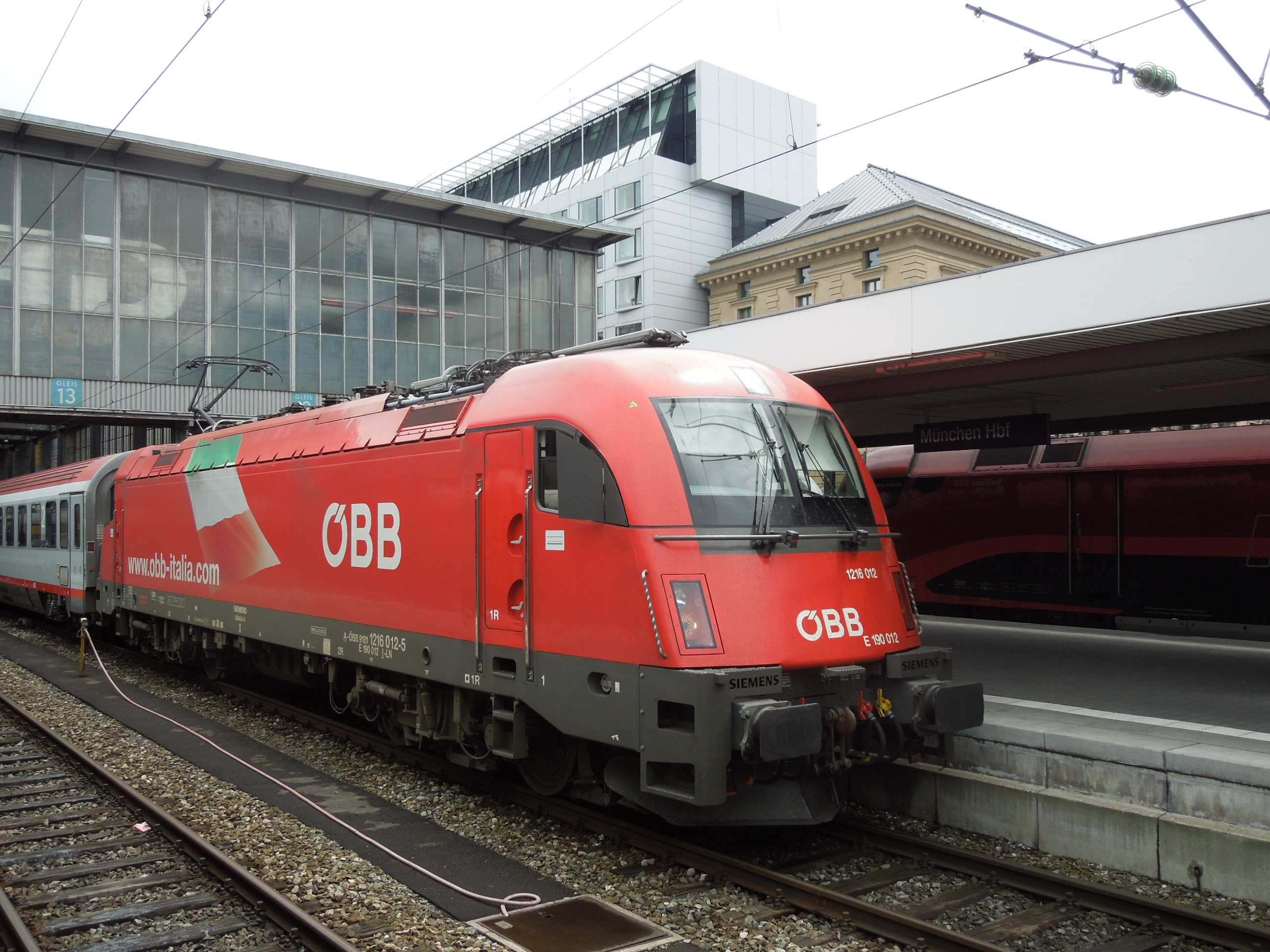 Egy ÖBB 1216 sorozatú villamos mozdonyMünchen Hauptbahnhofon